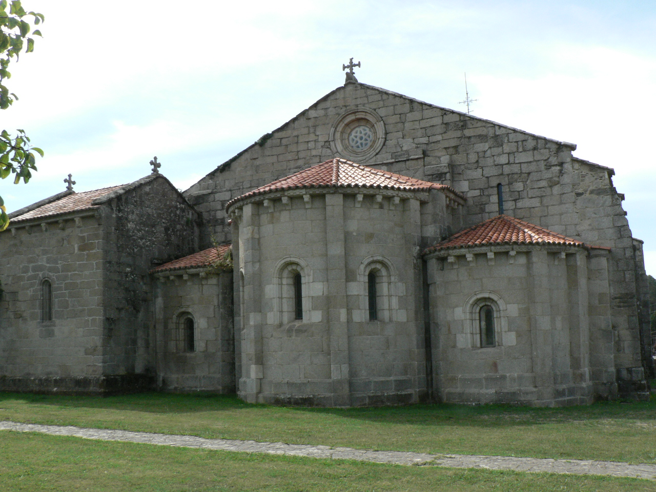 Bergondo, arquitectura relixiosa. Mosteiro de San Salvador de Bergondo